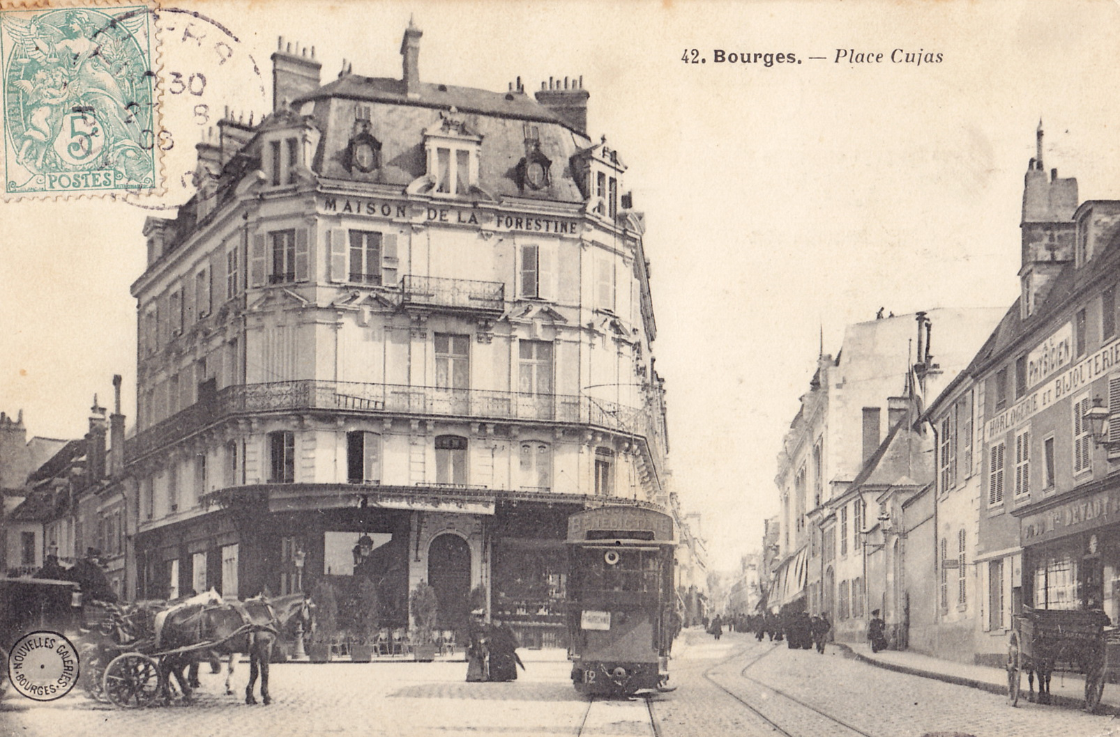 Carte postale ancienne éditée par Nouvelles Galeries de Bourges, n°42 : BOURGES - Place Cujas